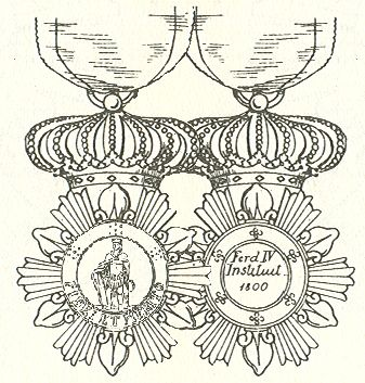 Orde van Sint-Ferdinand en de Verdienste Napels 1800 Ridder/knight